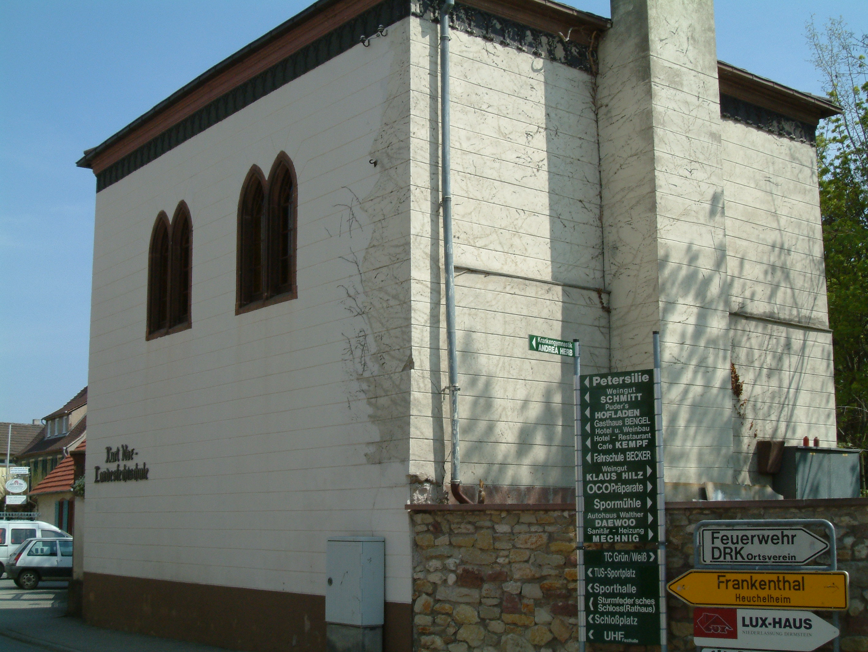 Fechtschule im Kellergarten zu Dirmstein, selbst fotografiert am 24.04.2006 und freigegeben durch Benutzer:Mundartpoet